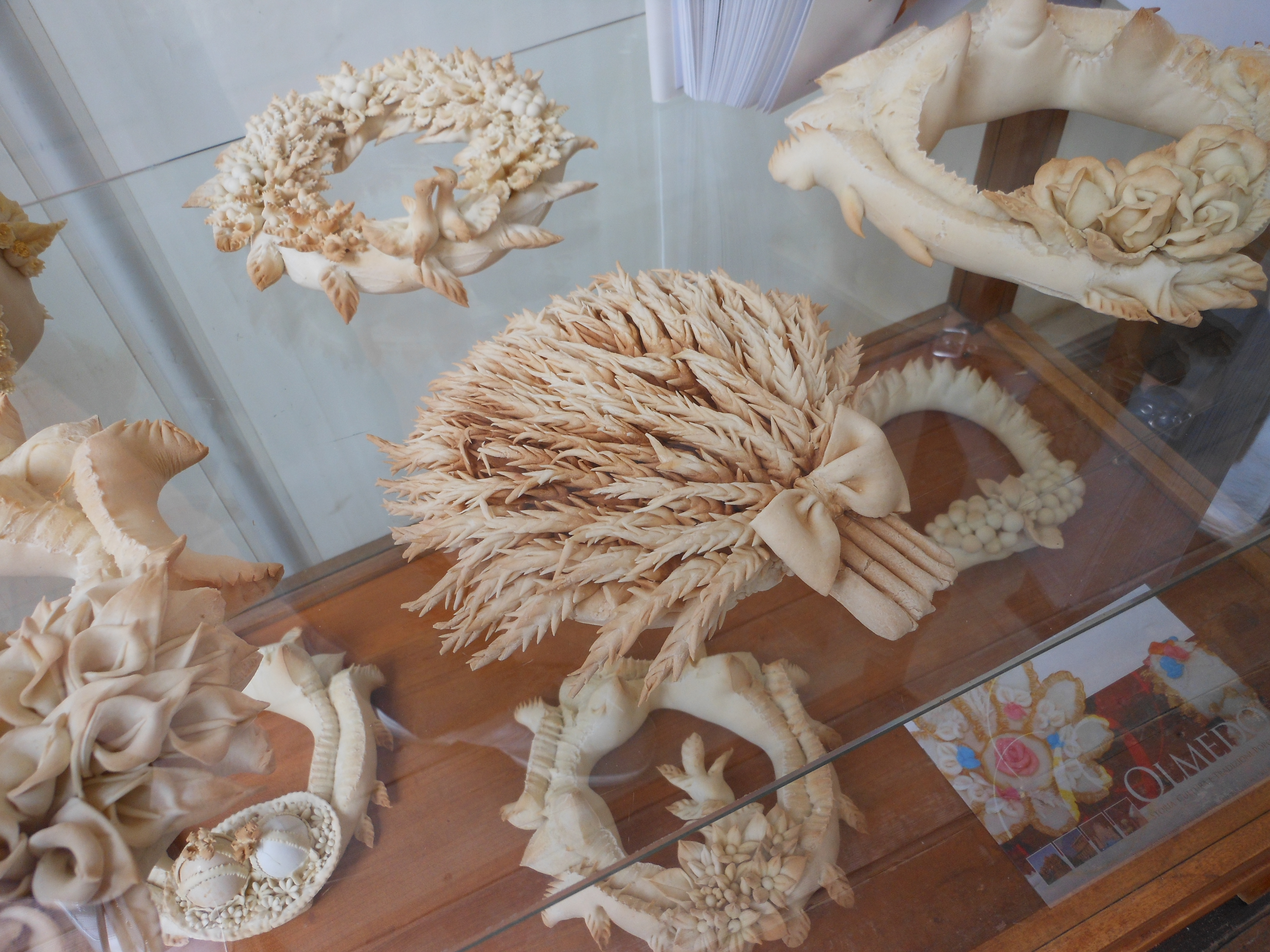 Pane tradizionale